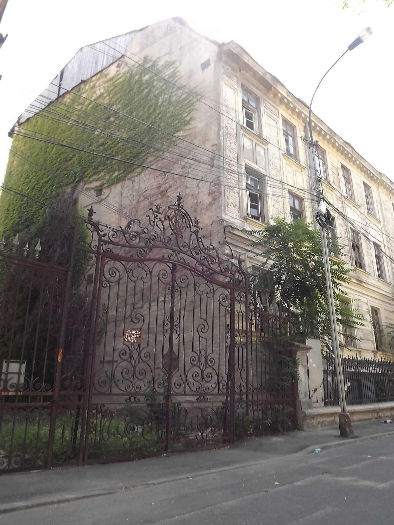 Intreprinderea de produse ortopedice